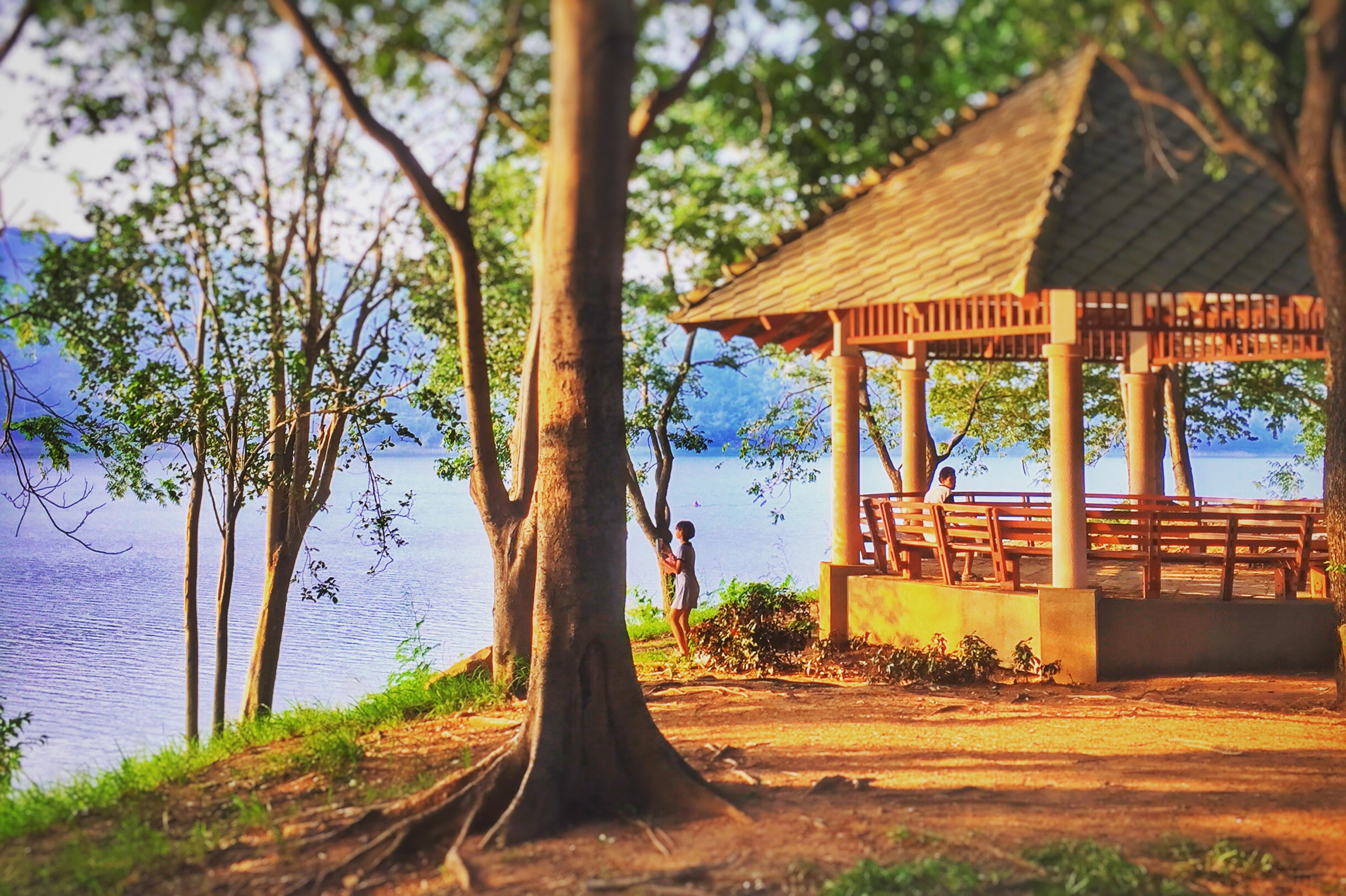 Nong Sarai, Pak Chong District, Nakhon Ratchasima 30130, Thailand